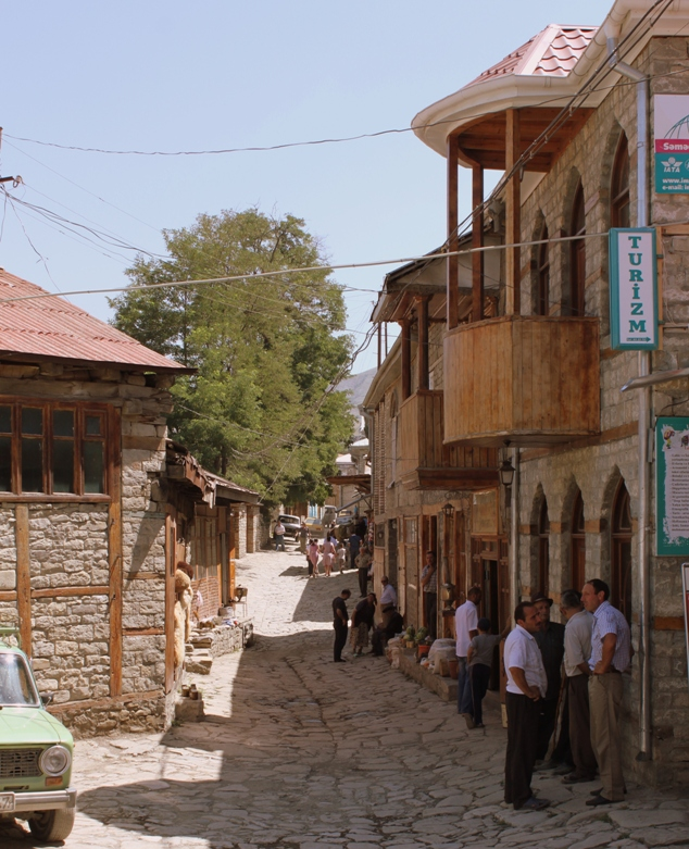 Село Лагич, Исмаиллинского района Азербайджана.